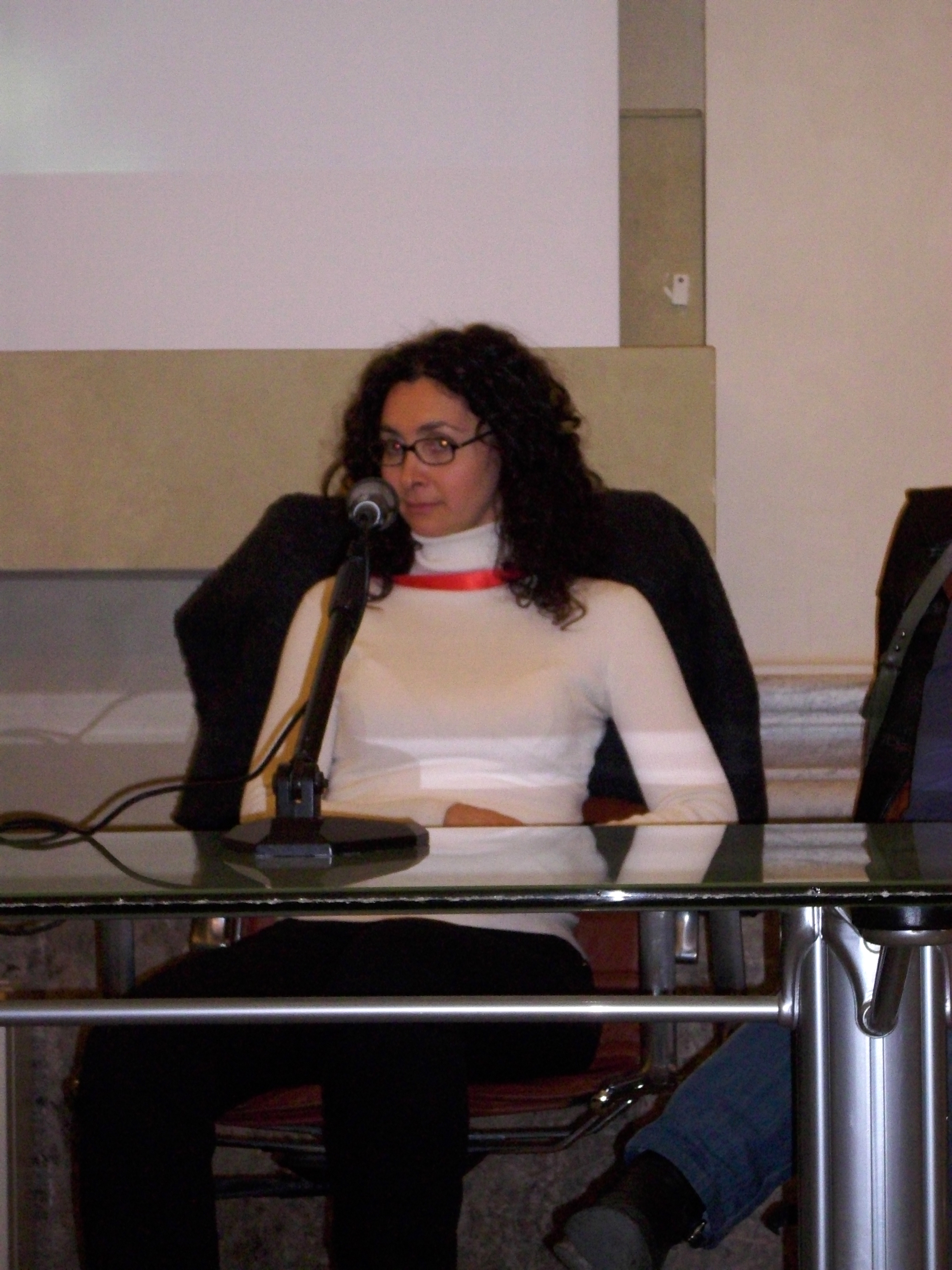 Presentazione del fumetto Greystorm della Sergio Bonelli editore a Lucca Comics 2009. Nella foto l'autrice dei disegni dei primi albi, Simona Denna.